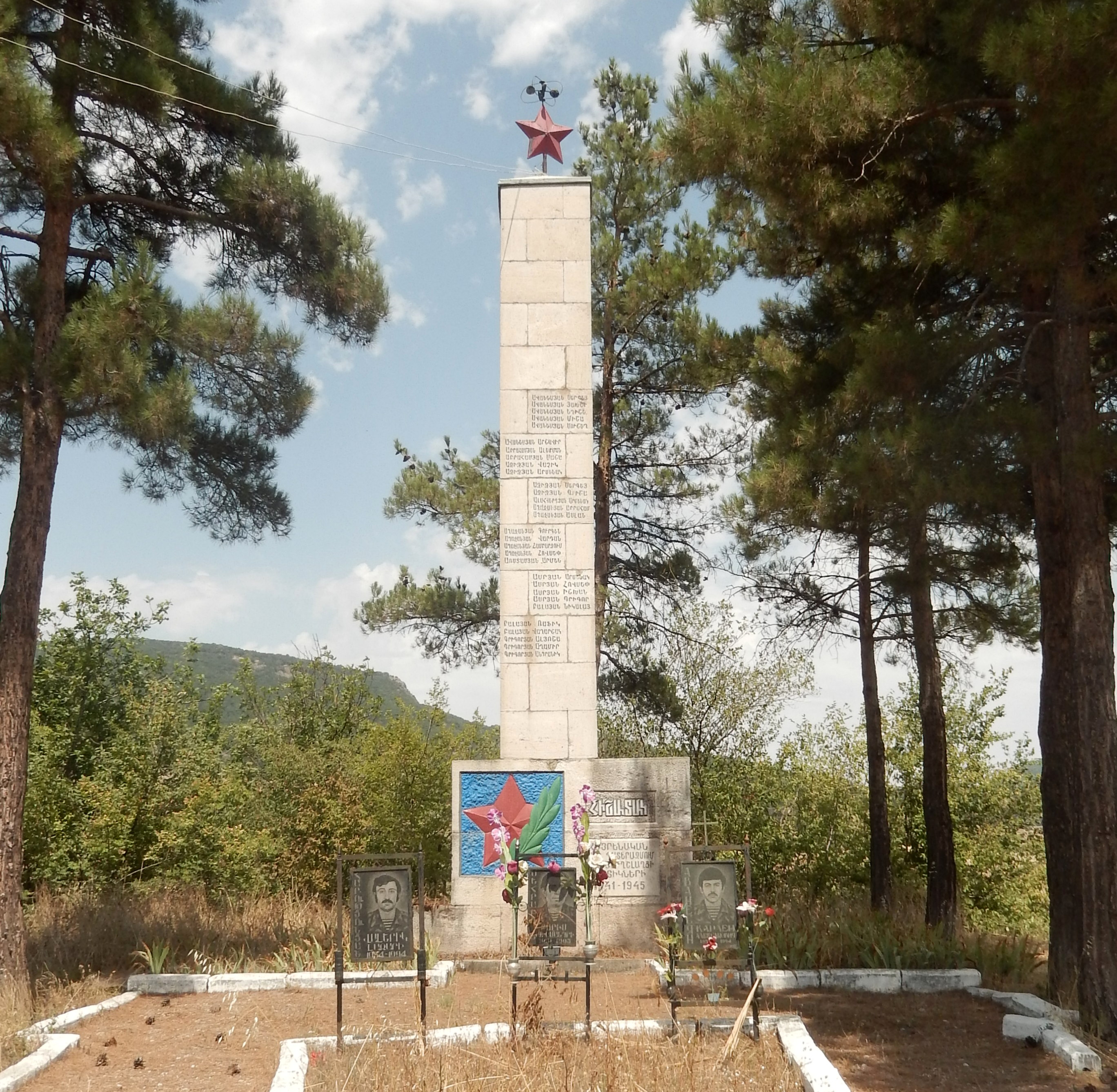 Հուշարձան 2-րդ աշխարհամարտում զոհված Ղշլաղցիների